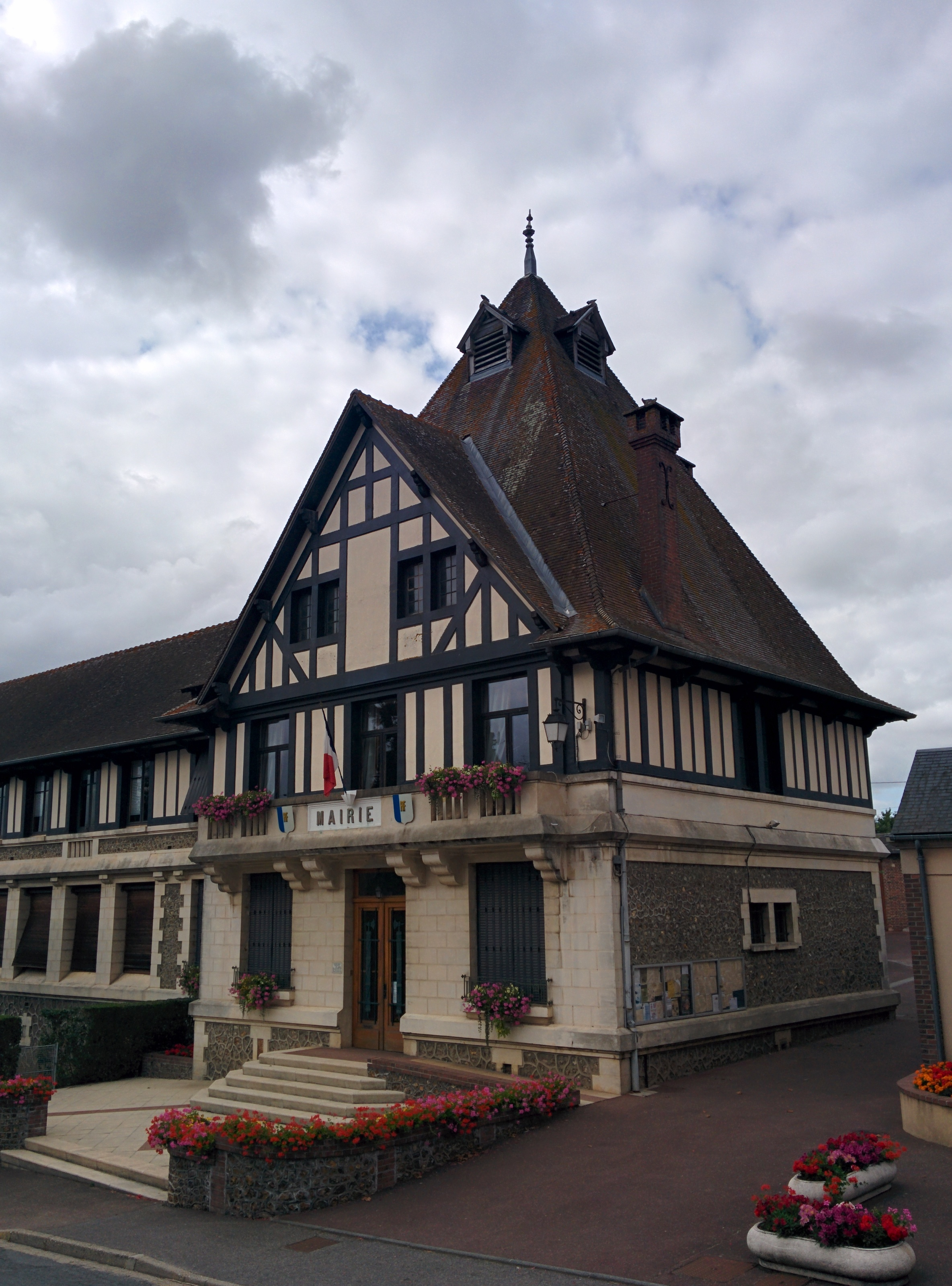 Mairie de la Neuve Lyre - Eure (27330)